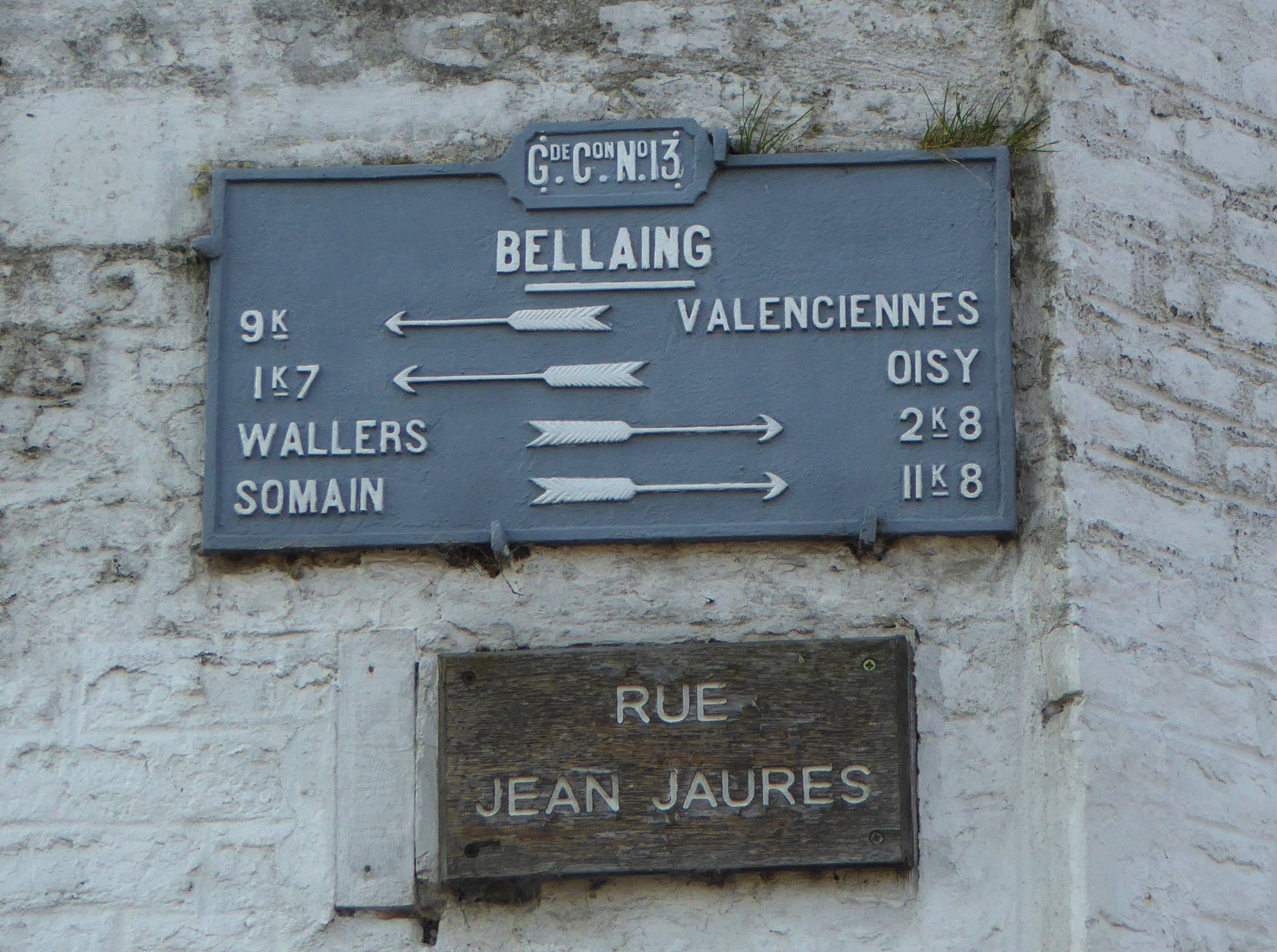 Plaque de cocher Bellaing Nord (département français).